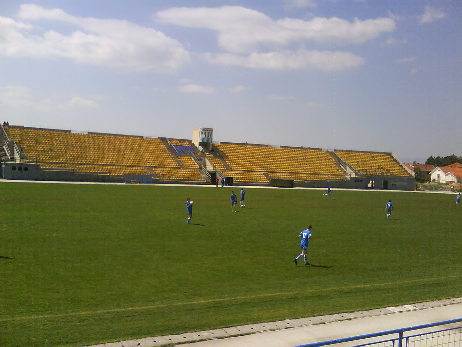 Mokri Dolac football stadium in Posušje